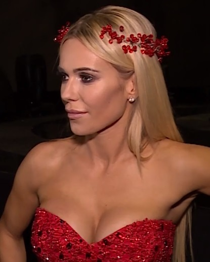 Doda podczas Krajowych Eliminacji do Konkursu Piosenki Eurowizji 2017, luty 2017.